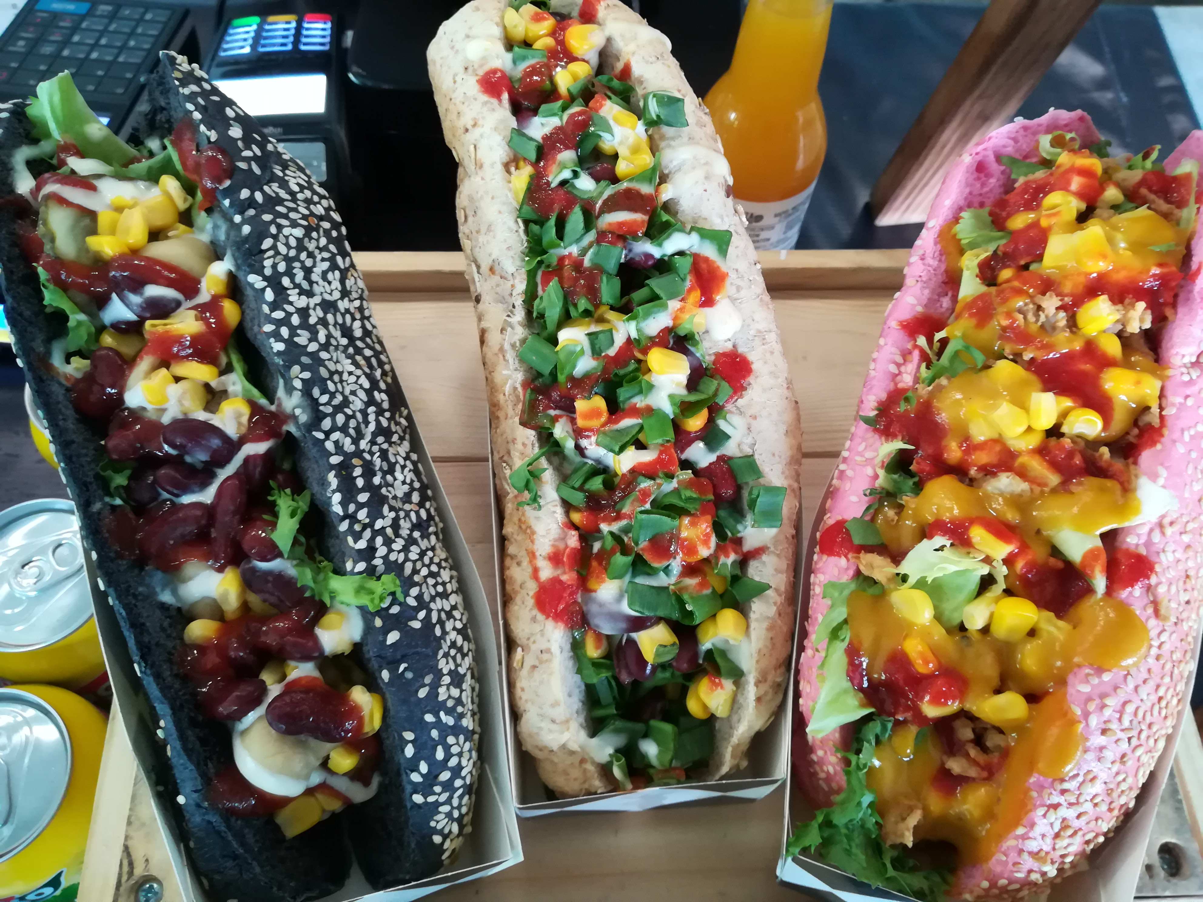 Maj 2019 r. Wegetariański festiwal kulinarny w poznańskiej Arenie.